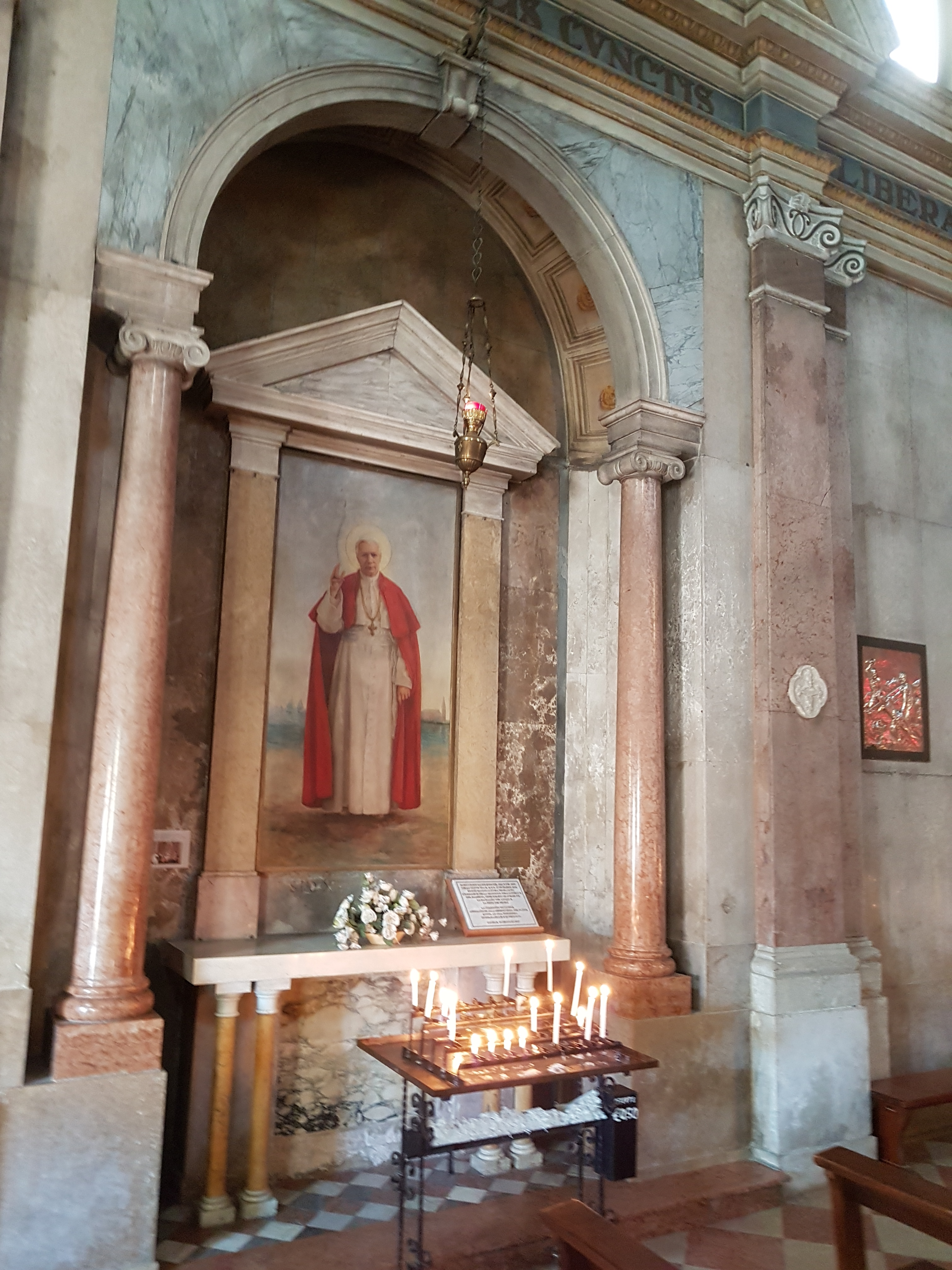 Santuario della Madonna dell'Angelo (Caorle)